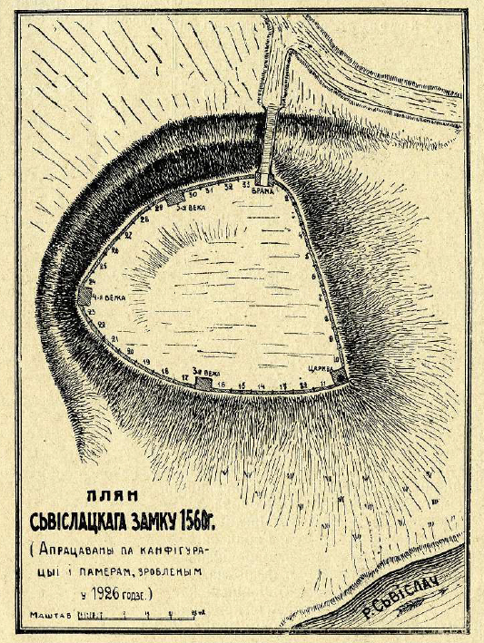 Беларуская (тарашкевіца): Сьвіслач (Śvisłač). Замак